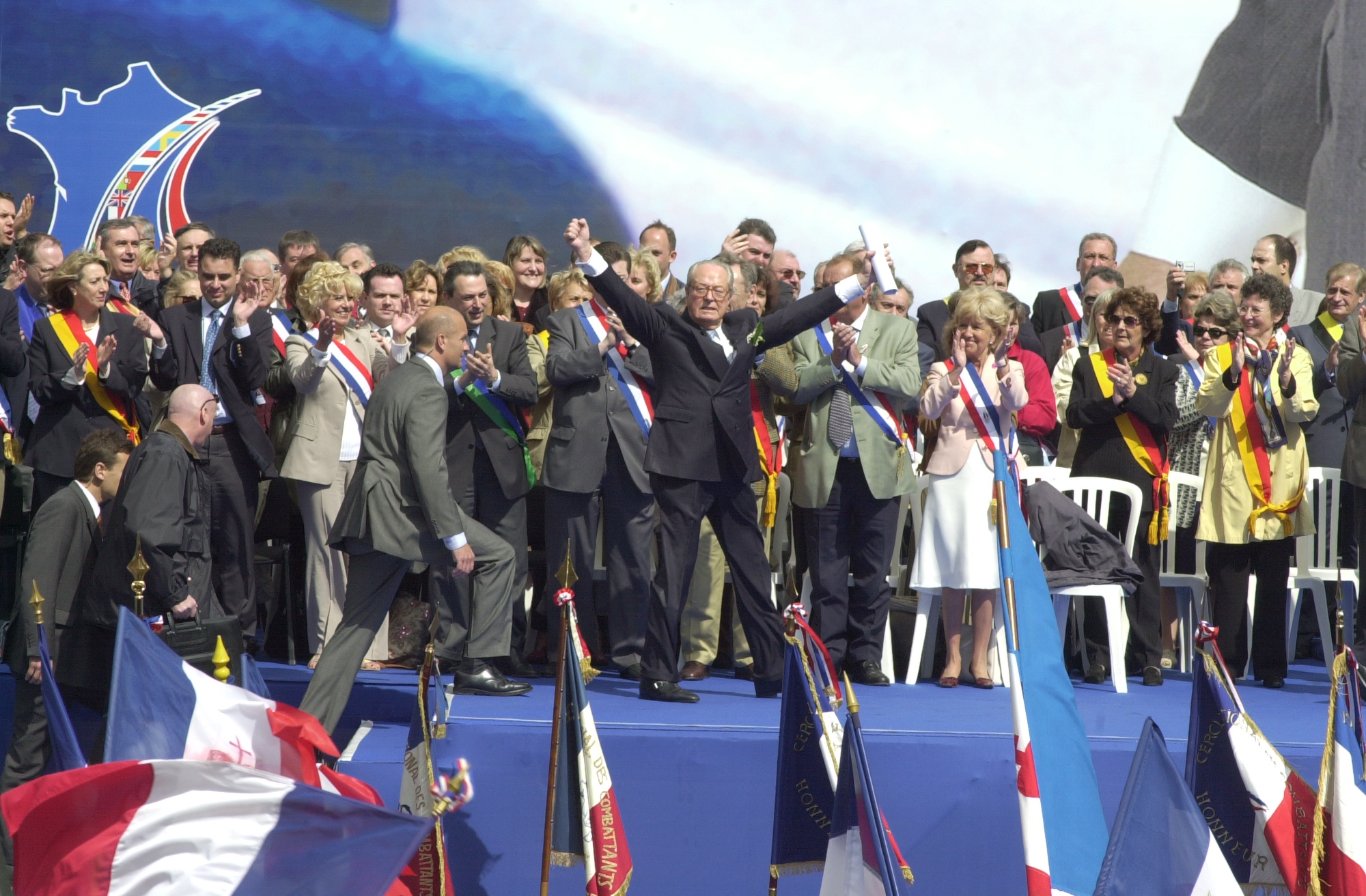 Jean Marie Lepen President Du Front NationalÆnglisc: Jean Marie Lepen President Of National Front French Party